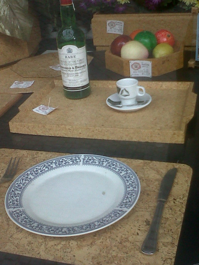 Objets d'artisanat en liège dans une vitrine à Porto (Portugal)